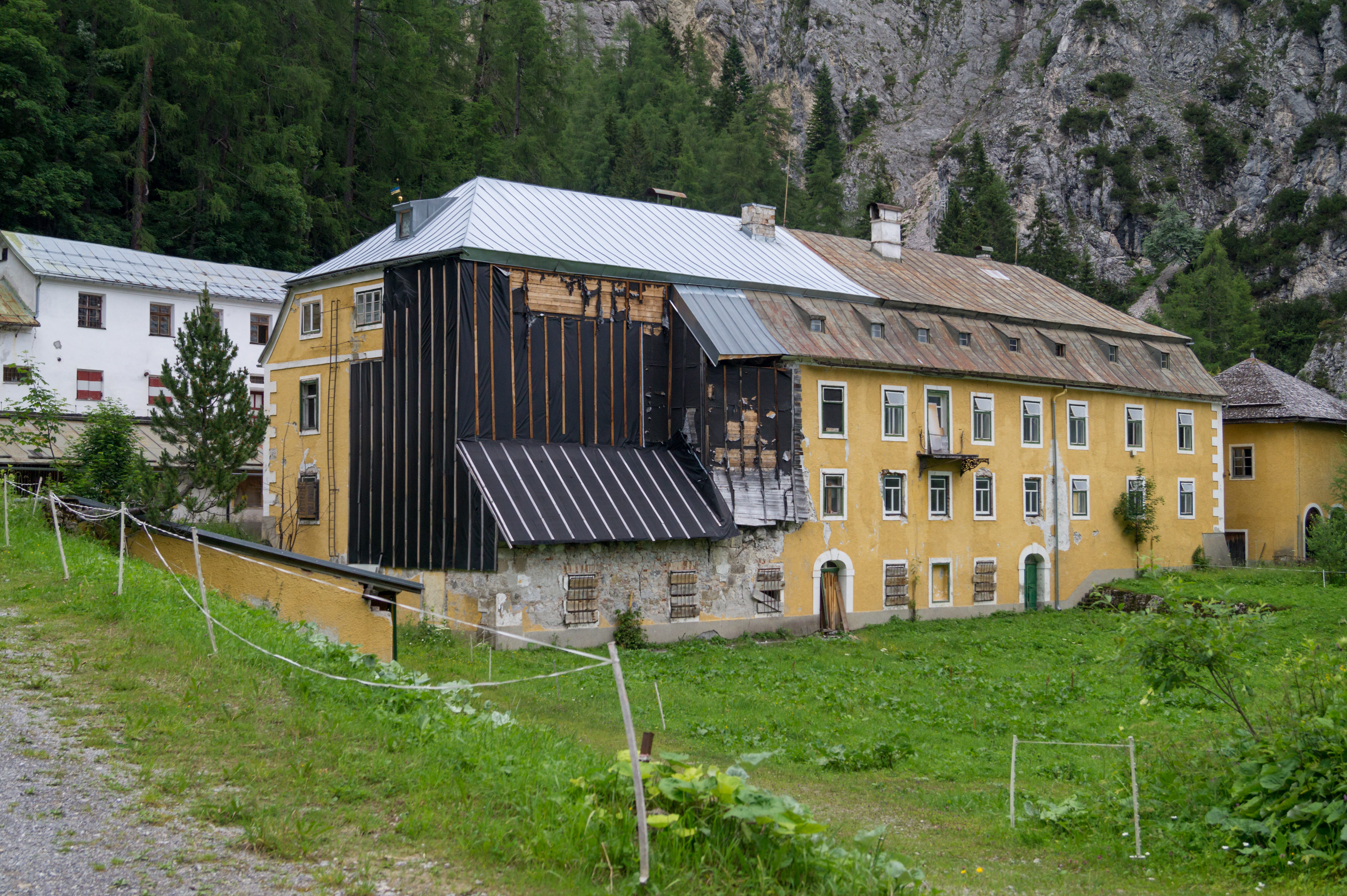 Halltal, Tirol: Herrenhäuser.